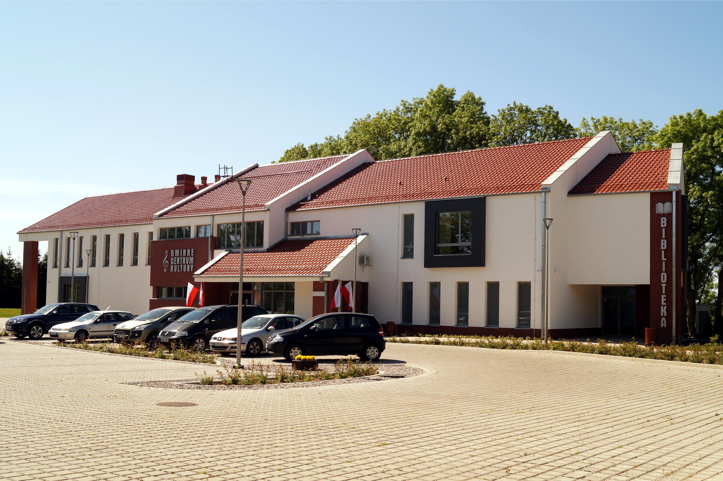 Gminne Centrum Kultury w Kłodawie, ul. Jeziorna 8